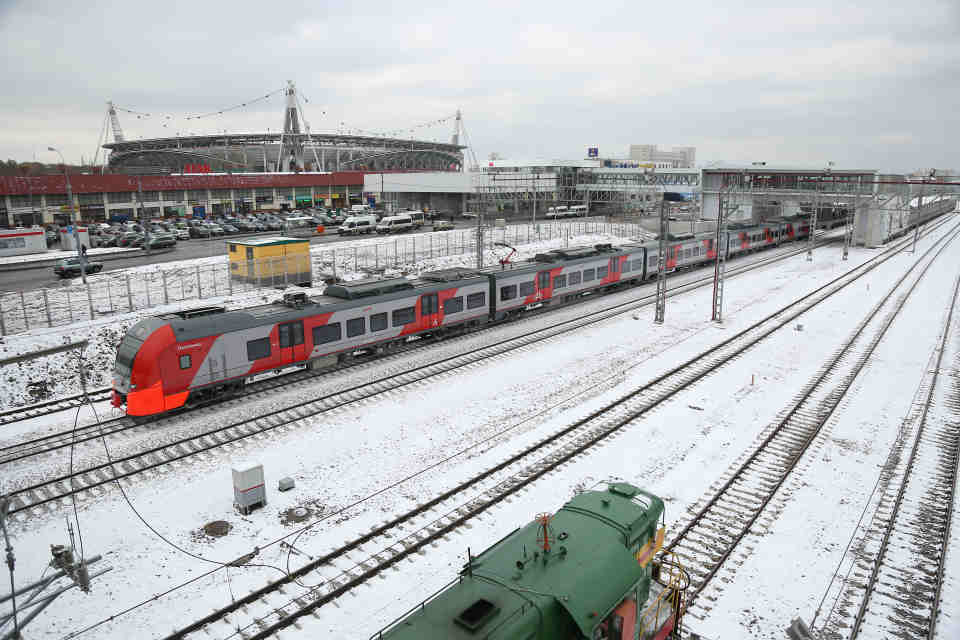 Станция Черкизово и о.п. Локомотив на Малом кольце МЖД. Электропоезда ЭС2Г Ласточка и тепловоз ЧМЭ3